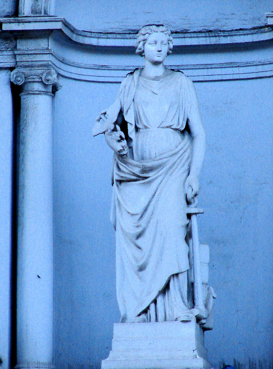 Nicheskulptur, Vesterbrogade overfor Industriens Hus, København